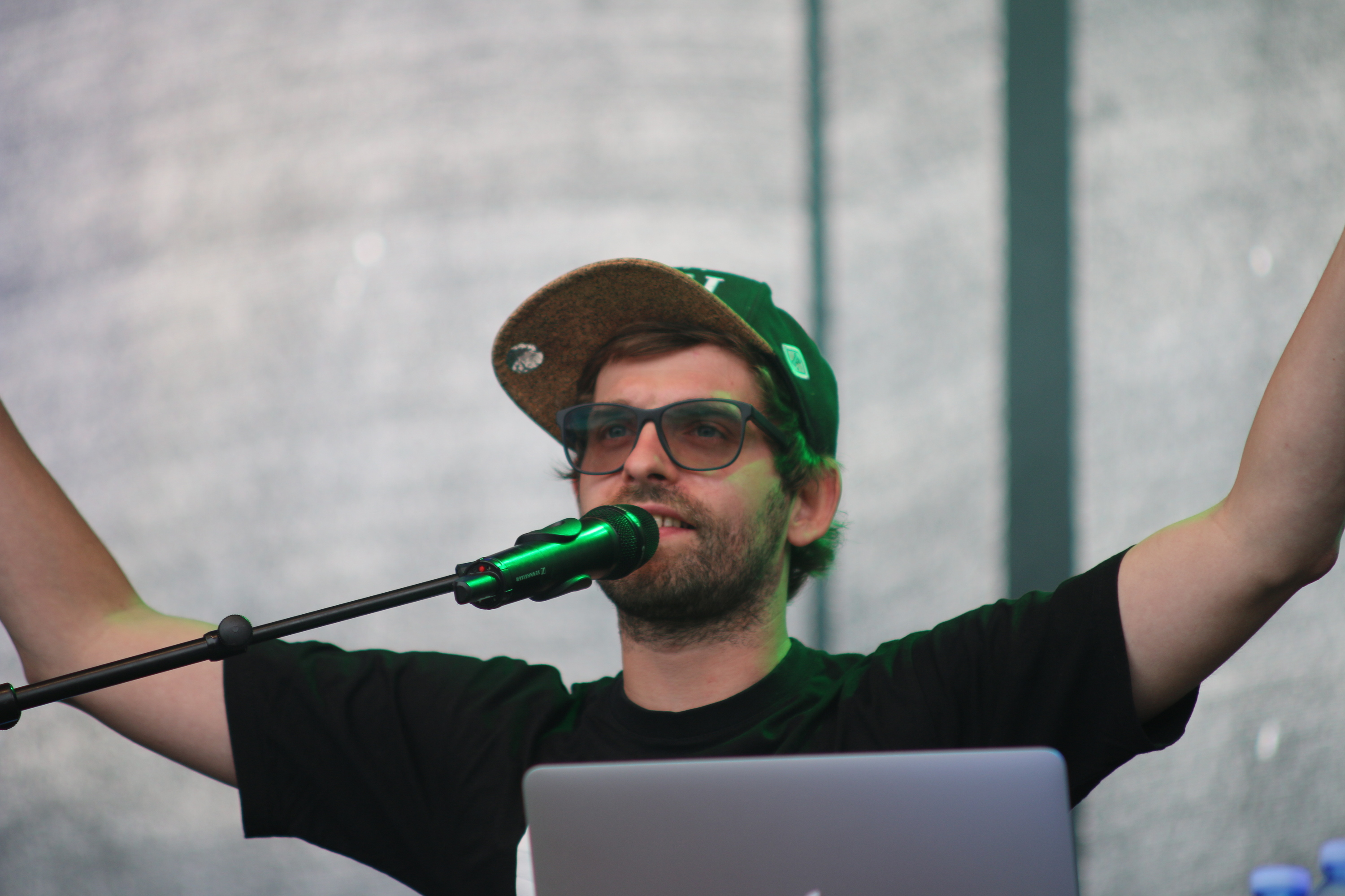 Folklore 014 in Wiesbaden: Deine Freunde